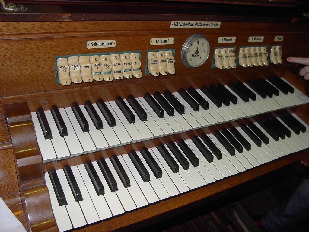 Spieltisch - St. Pavel Cathedral, Rousse